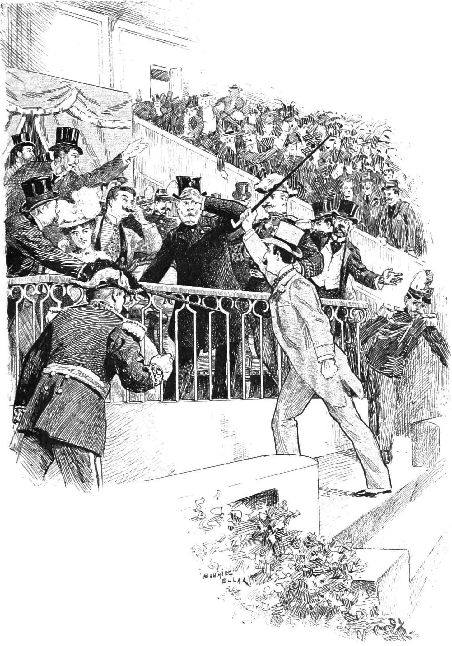 "Le grand steeple-chase d'Auteuil. Agression contre le Président de la République".